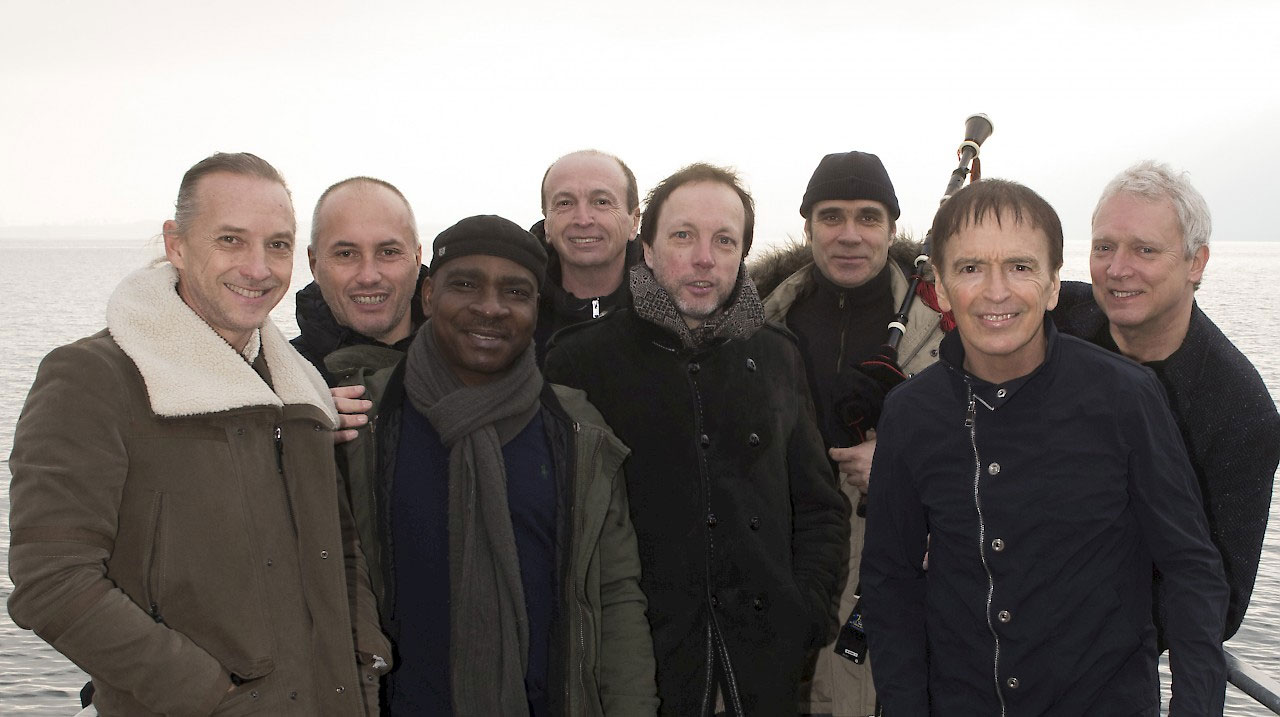 groupe I Muvrini